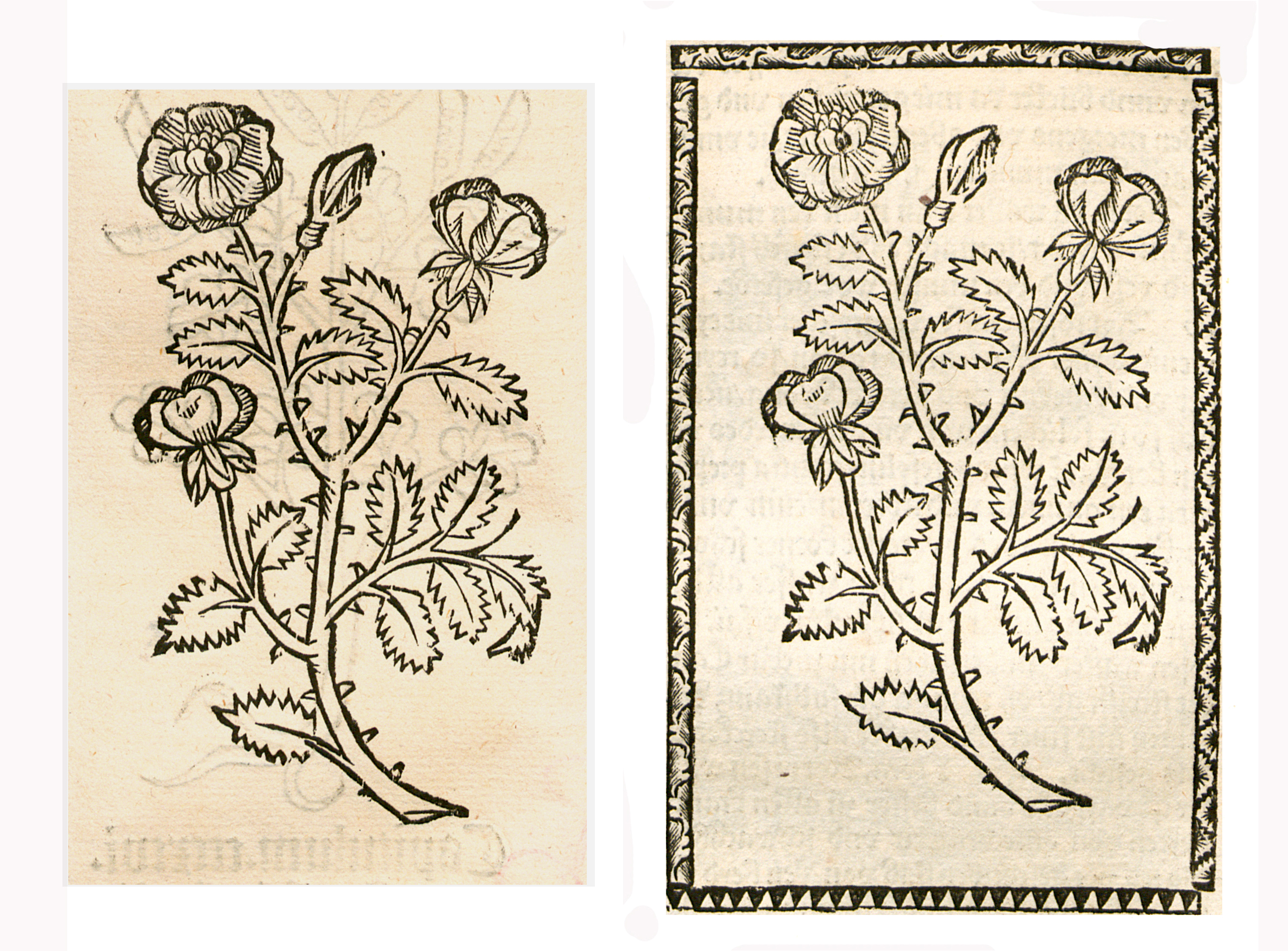 Abbildung von: Rosen